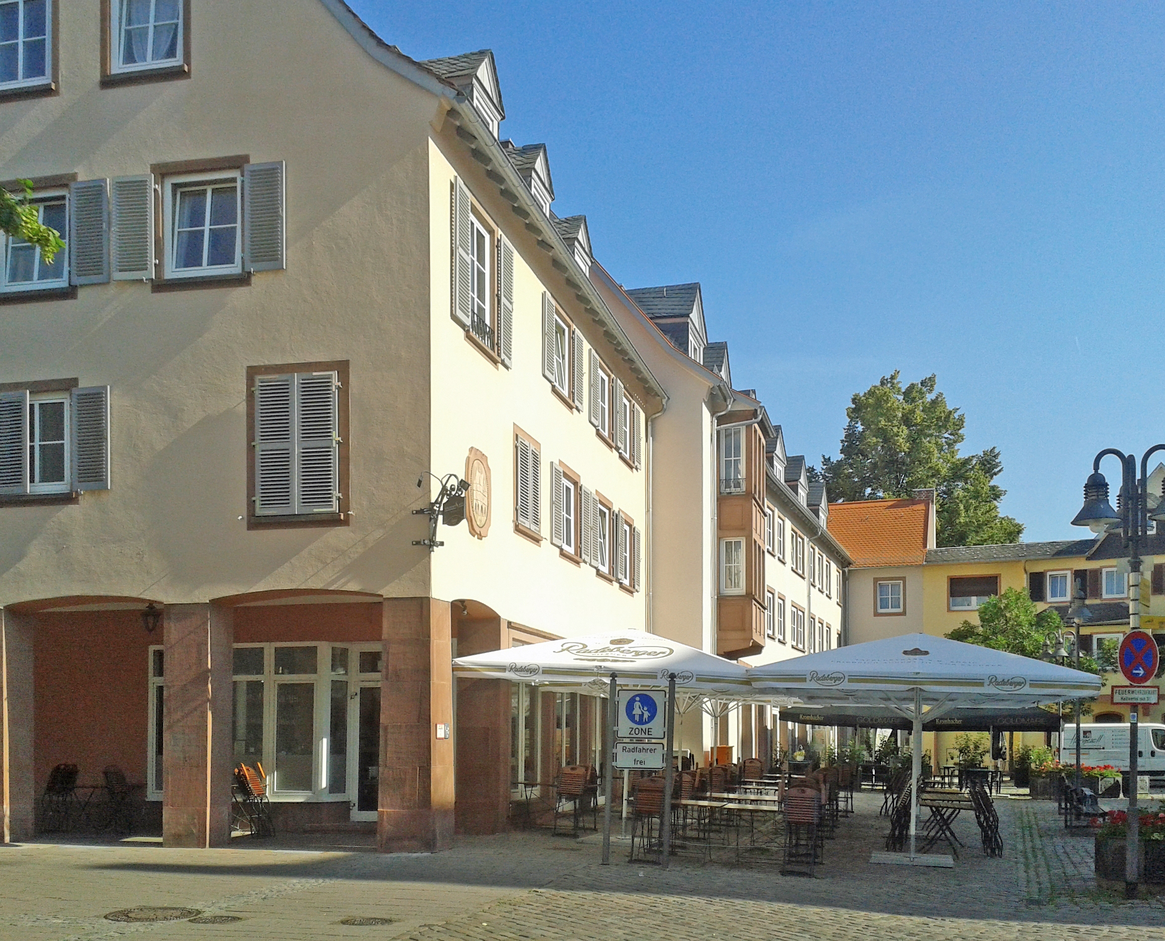 Am Altstädter Markt